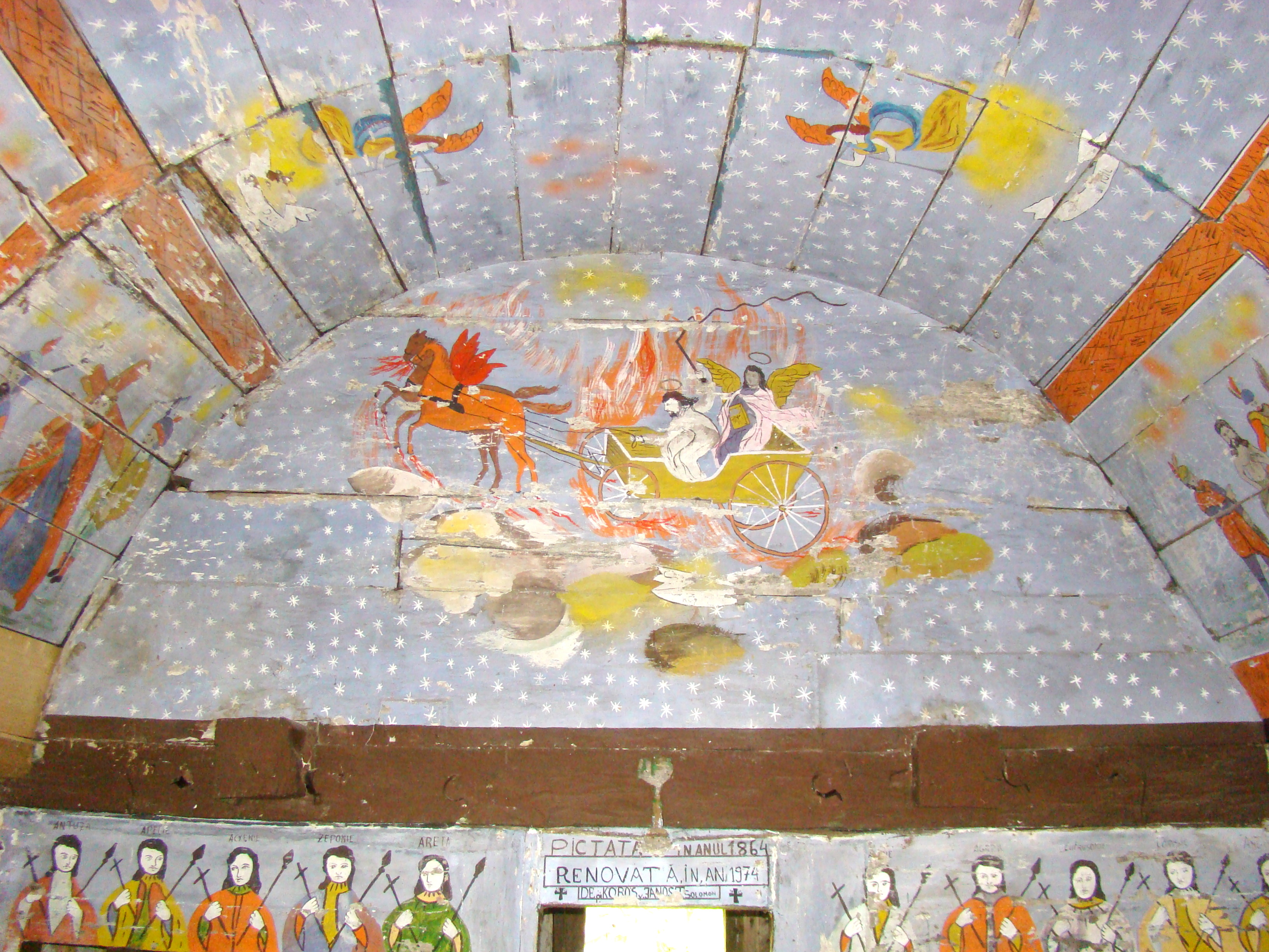 Biserica de lemn din Toplița, comuna Letca, judeţul Sălaj